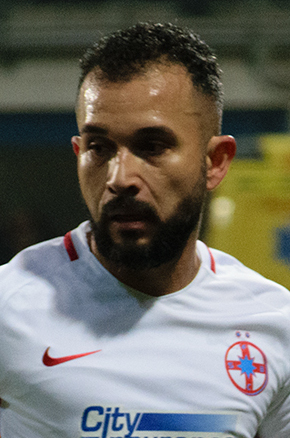 Júnior Morais